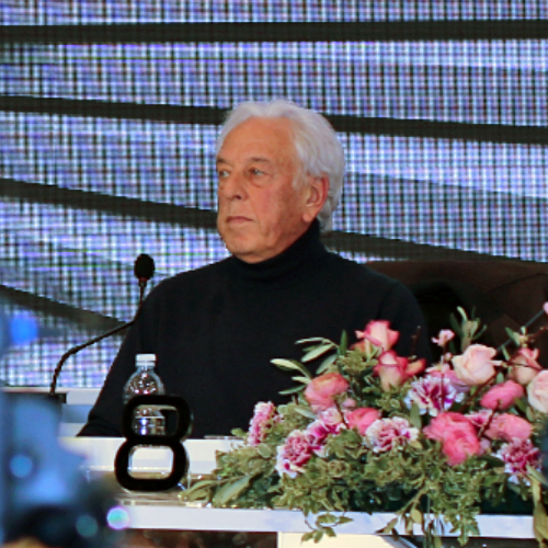 Il compositore, cantautore e produttore discografico italiano Mario Lavezzi in conferenza stampa al Festival di Sanremo 2018.